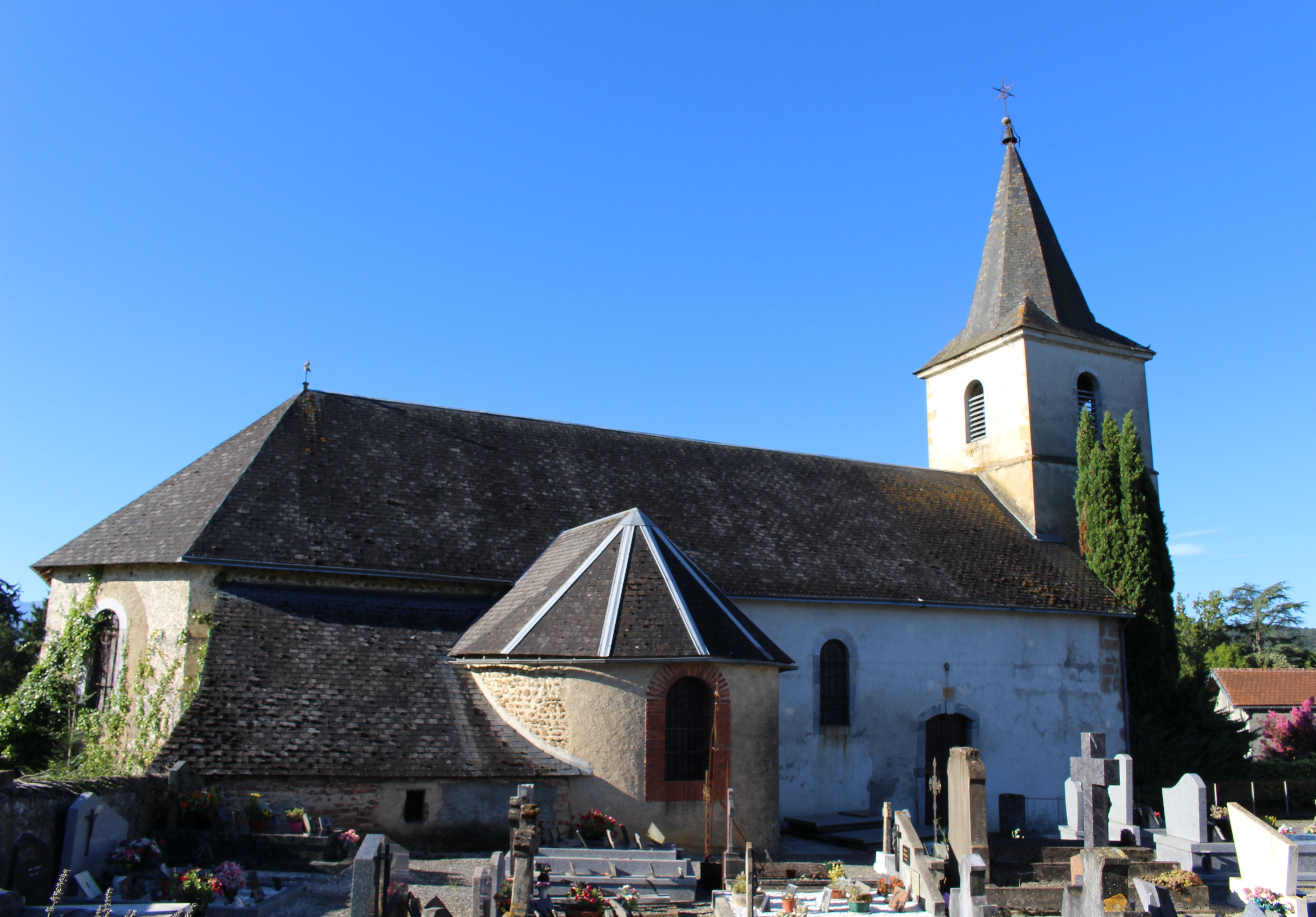 Église de l'Assomption d'Ozon (Hautes-Pyrénées)